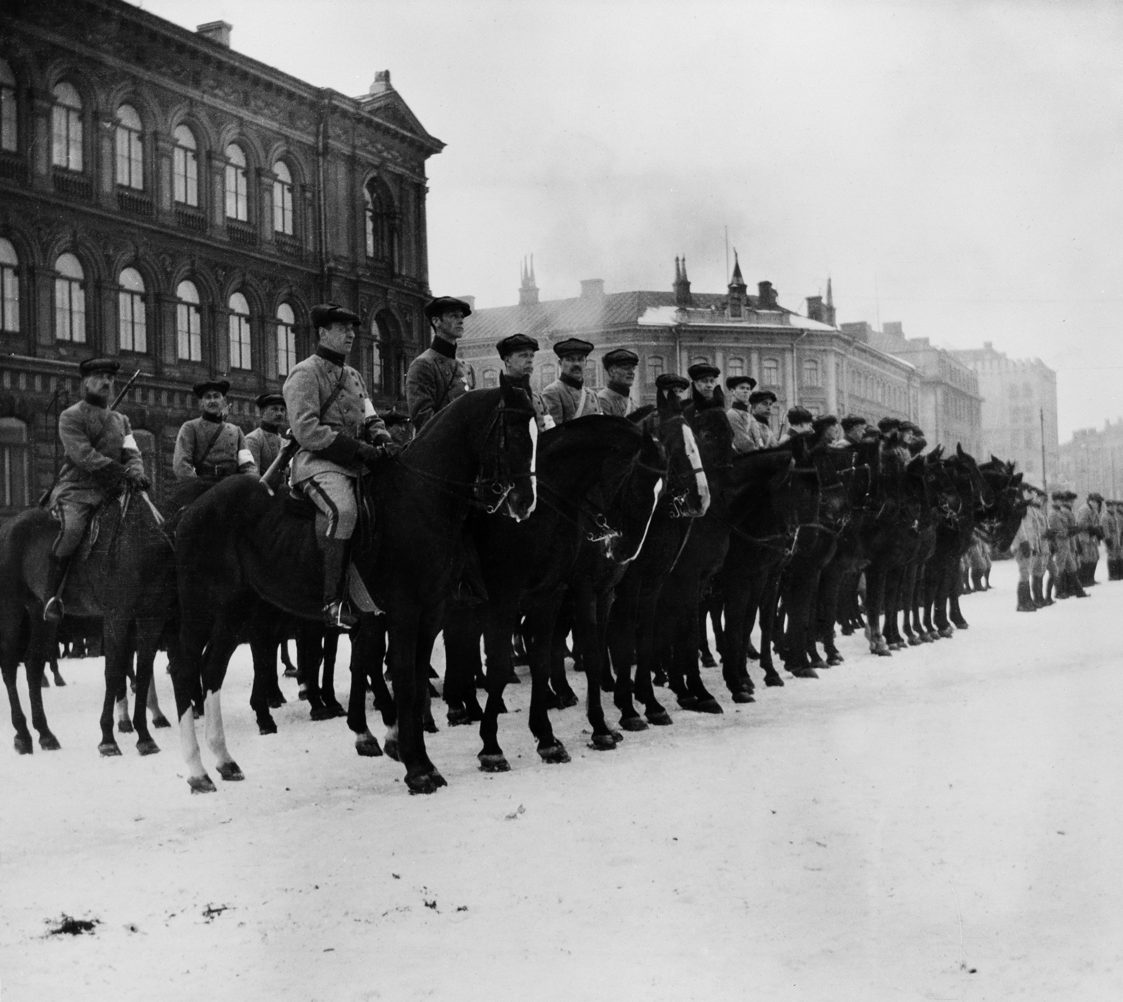 Suojeluskunnan ratsuväkeä Rautatientorilla.; negatiivi, nitraatti, mv